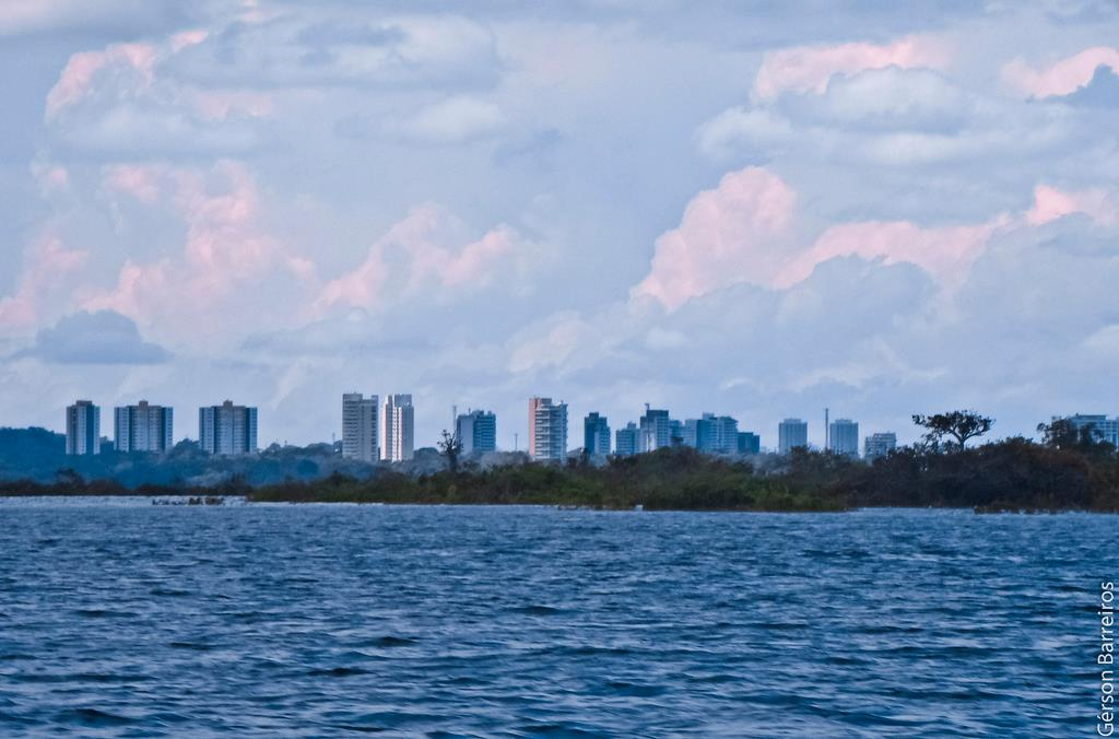 foto da cidade de manaus a partir do ri negro